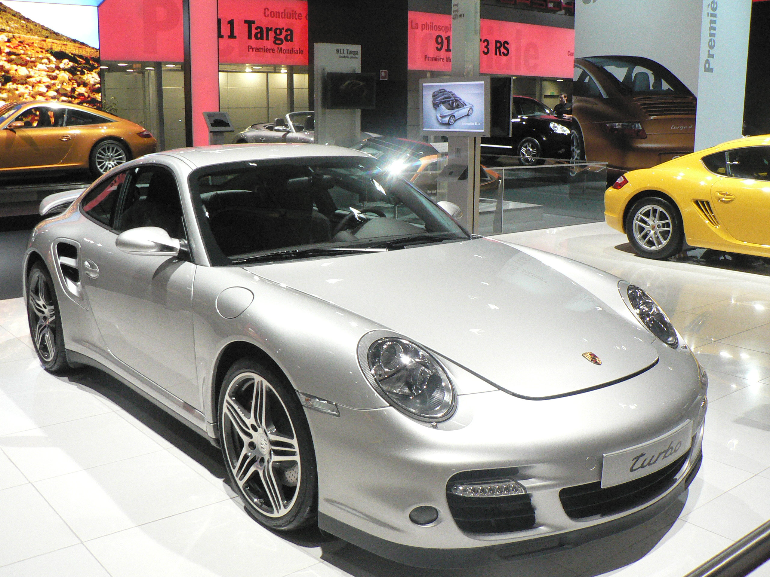 Mondial de l automobile de Paris (October 2006)